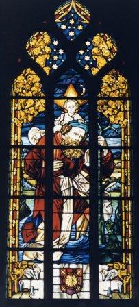 Glas in lood van Christoforus in de Christoforuskerk in Schagen, gemaakt door Otto Mengelberg in 1920